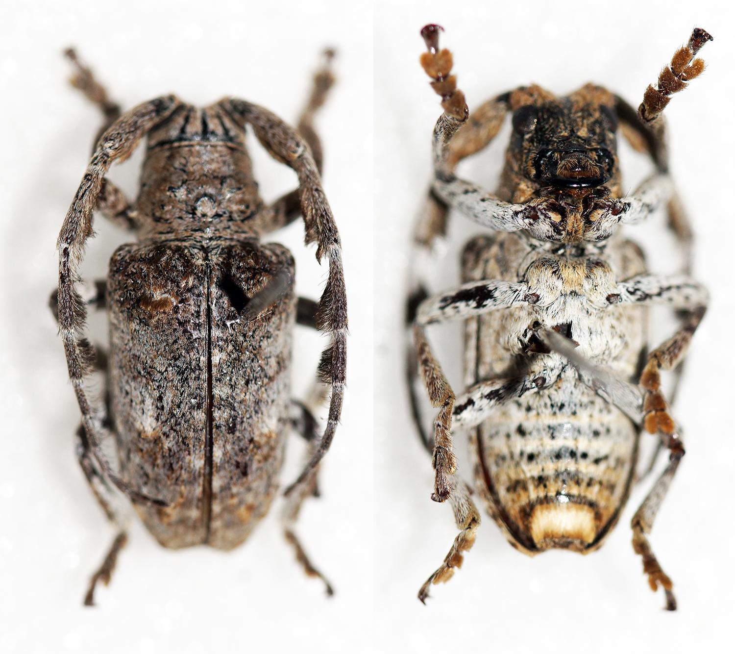 Audinet-Serville,1835 Sex: ? Data: 29-07-11 - Makambako - Njombe District - Morogoro - Tanzania Size: 13mm